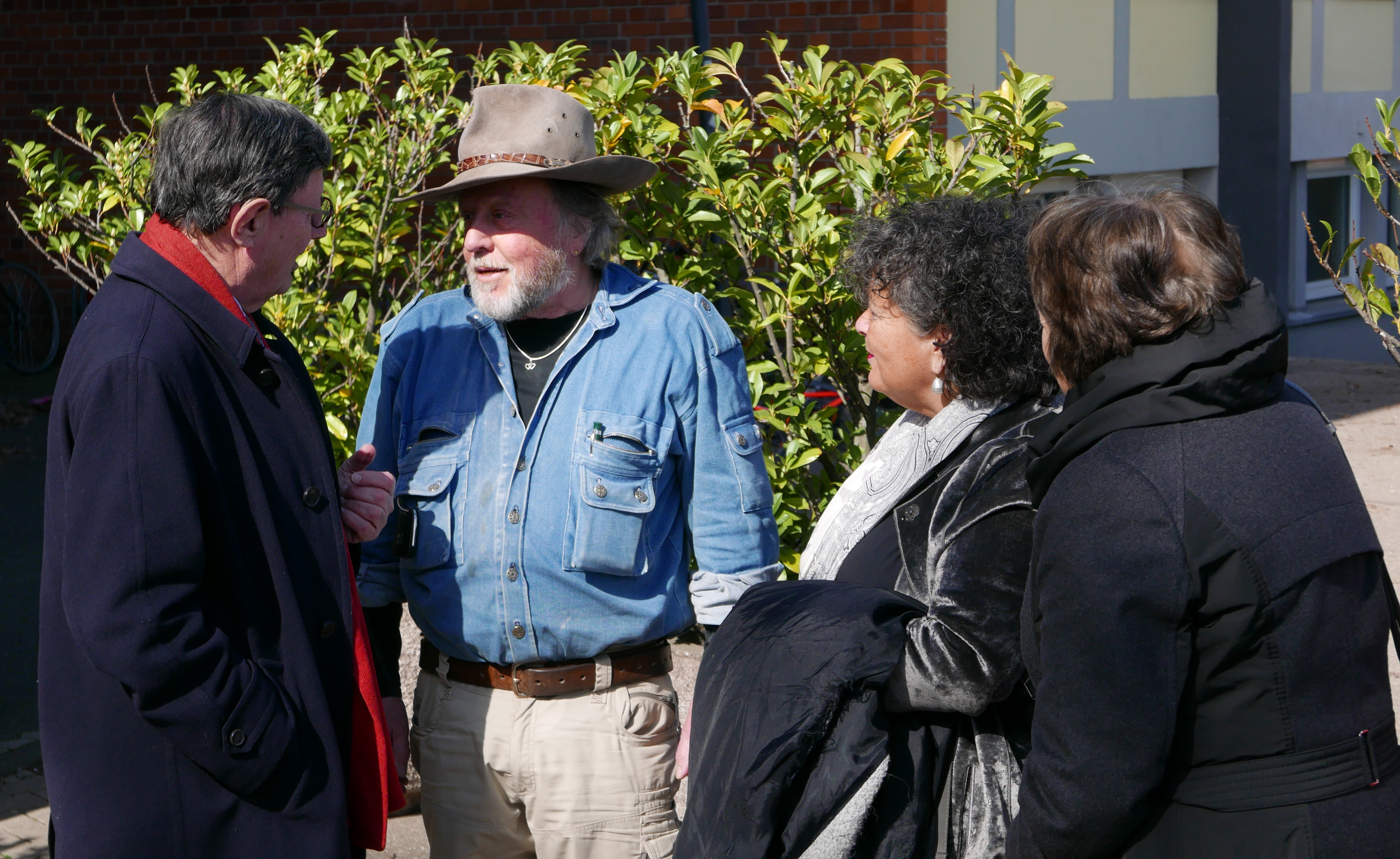 Stolpersteinverlegung: Gymnasium Kreuzgasse 19. März 2019; Gunter Demnig